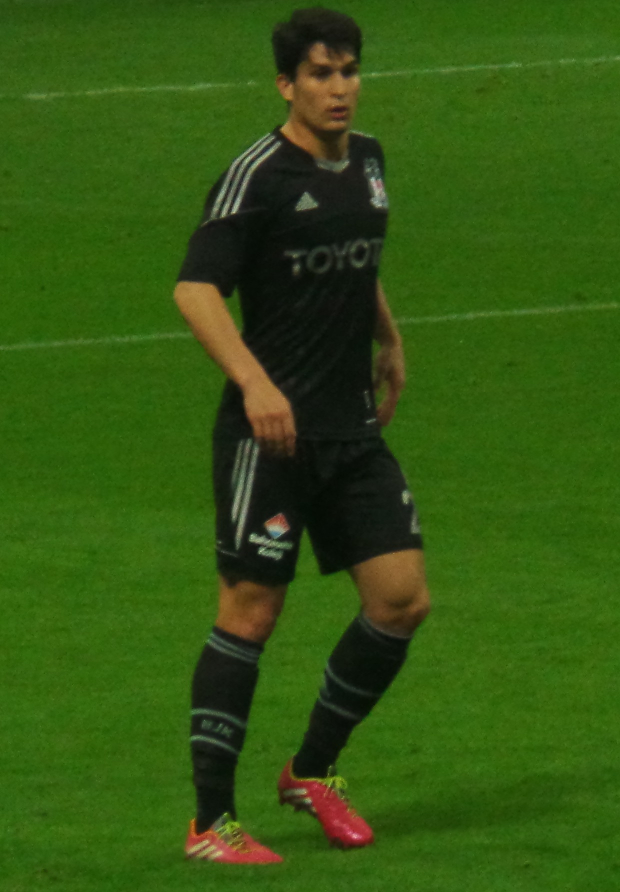 Necip Uysal'14